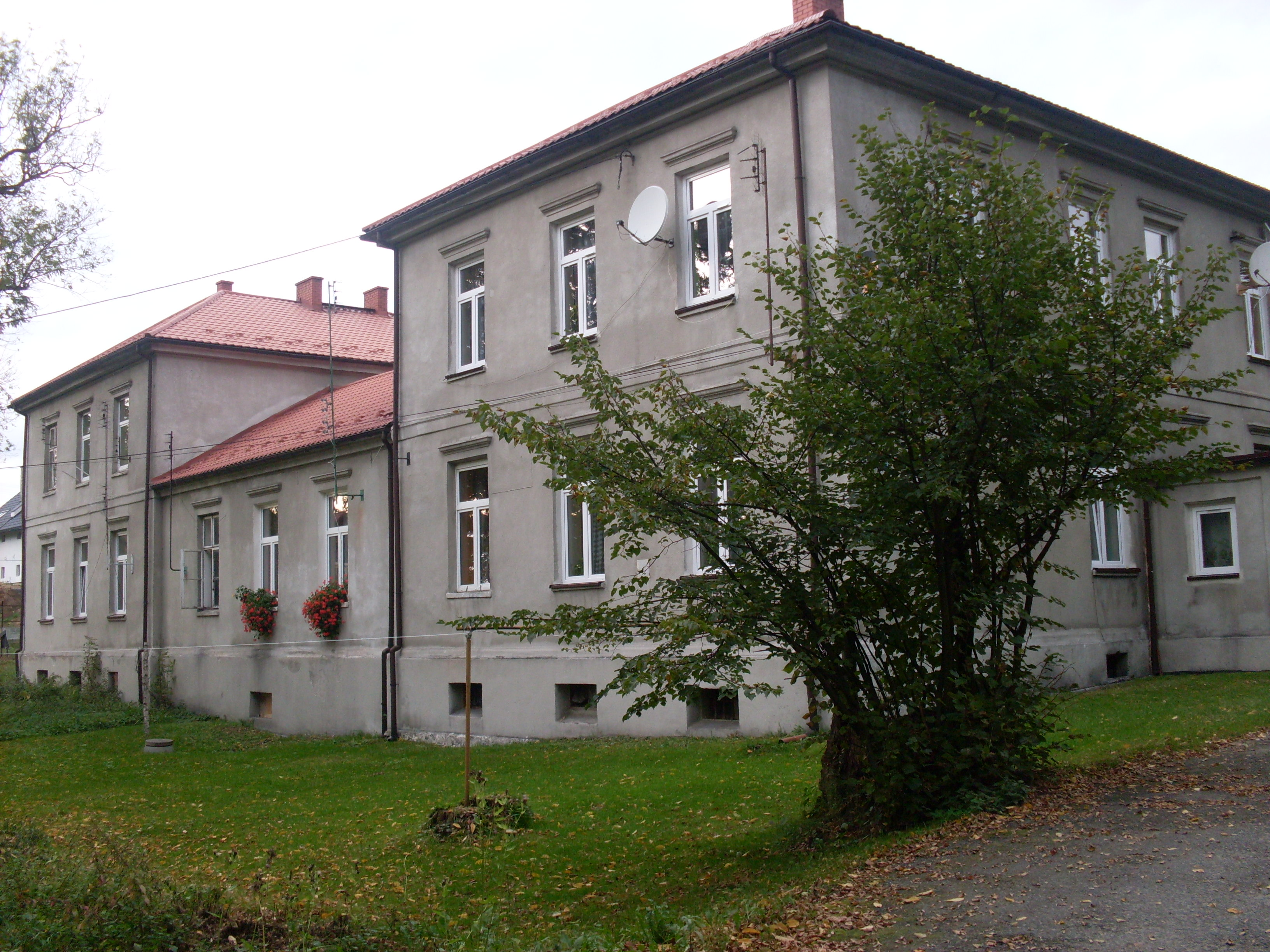 Stary Szpital.Krzeszowice